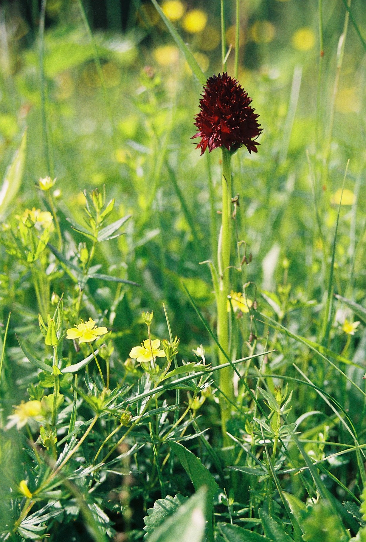 Nigritella nigra Sweden 2006